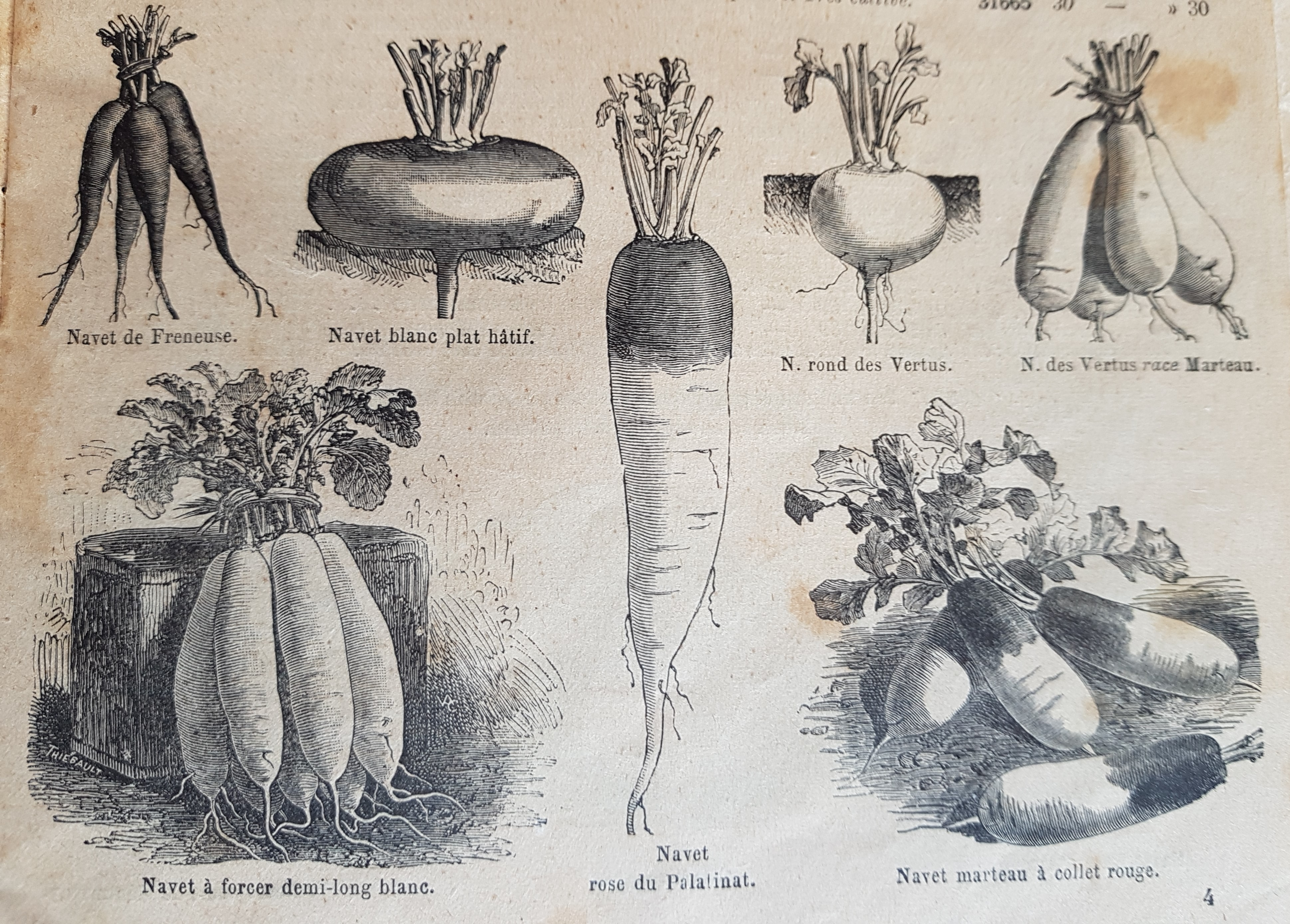 illustrations de diverses variétés de navets dans le catalogue Vilmorin-Andrieux du printemps 1900